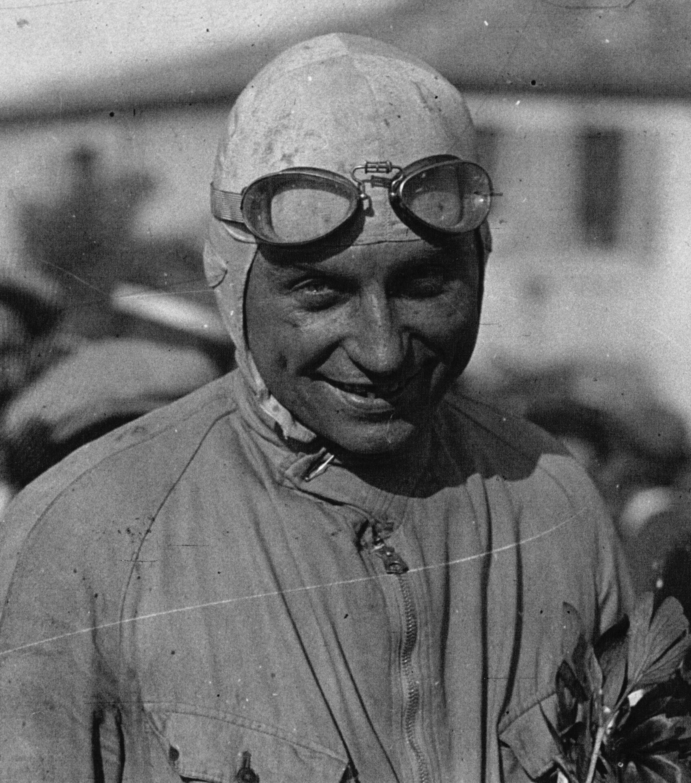 grand prix de Nîmes : portrait [de Benoit] (2 m.